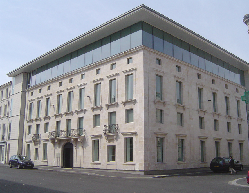 Musée Hèbre de St Clément de Rochefort (Charente-Maritime - France)